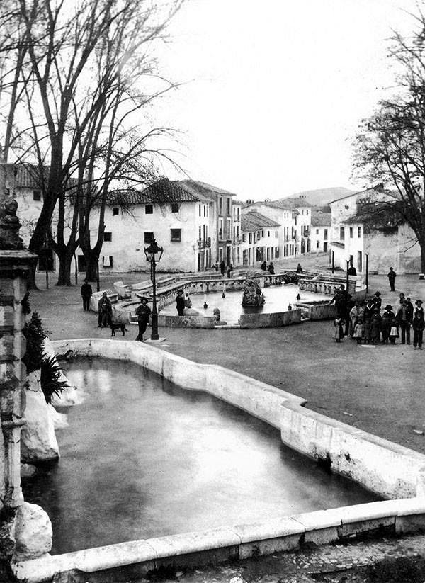 Fuente del rey en la antigüedad.